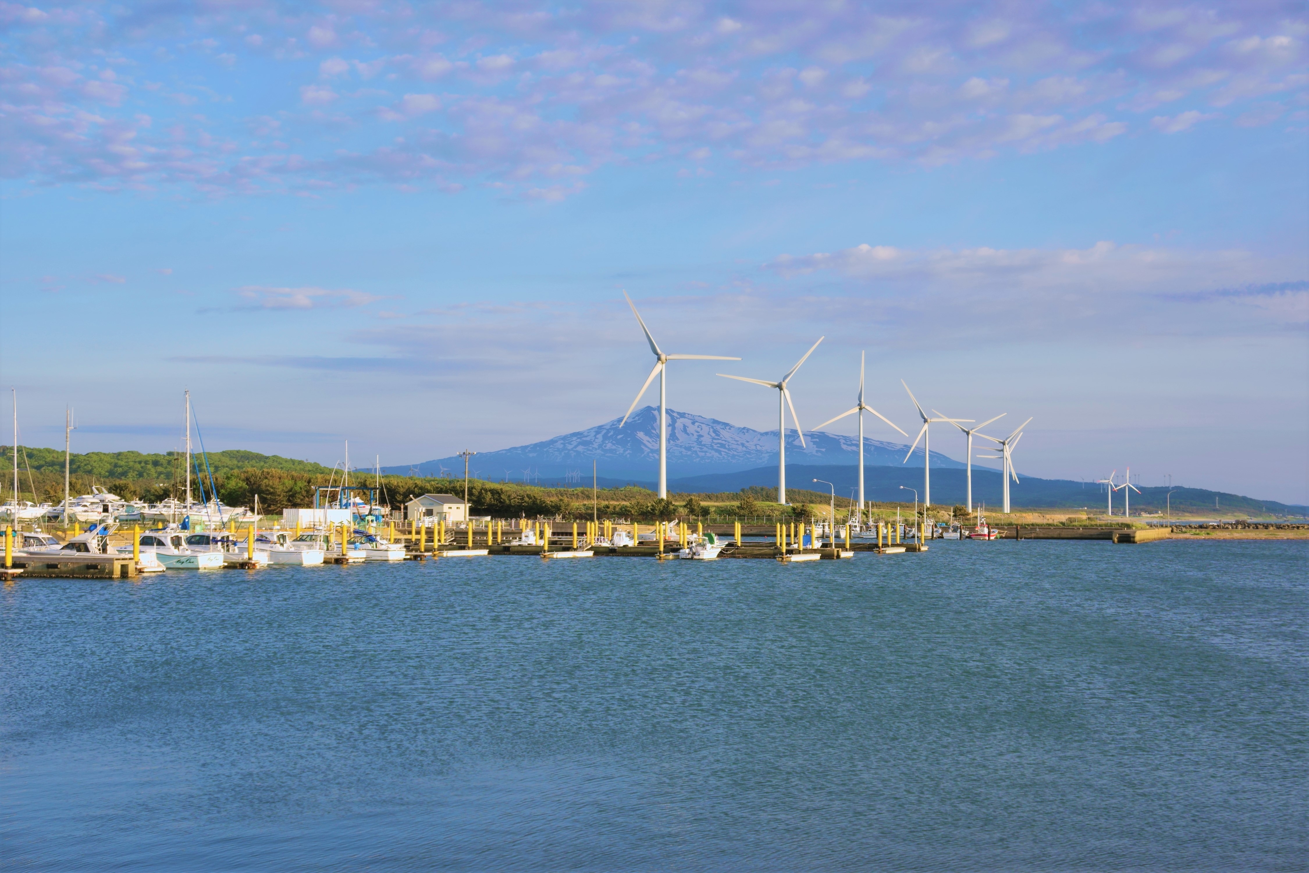 本荘マリーナから見た鳥海山（秋田県由利本荘市）